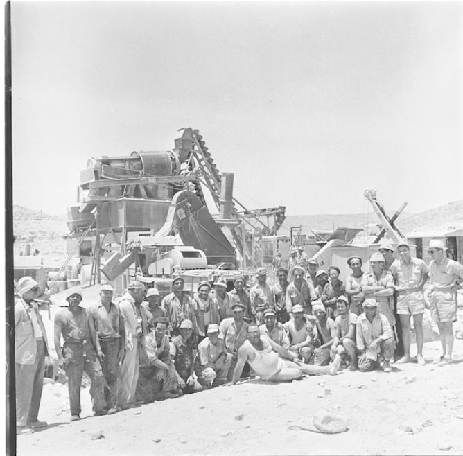 עובדי מעצ סוללים כביש לאילת 1957